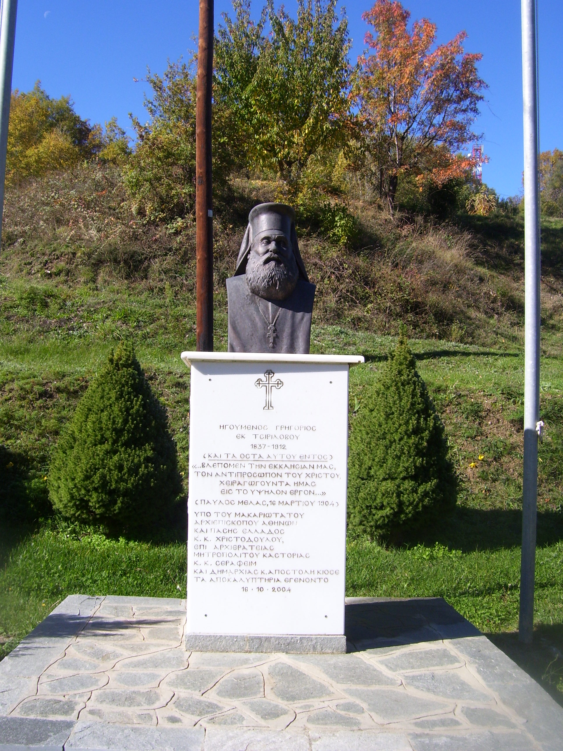 Статуя на Григорий Чуриловски в двора на Чуриловския манастир „Свети Николай“, Гърция.